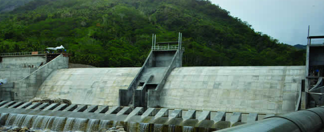 Taguibo Dam